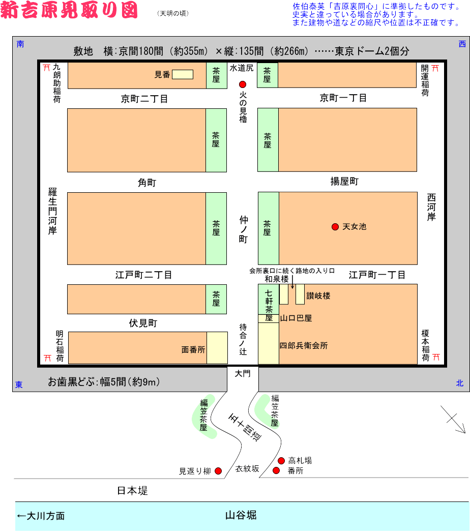 佐伯泰英著「吉原裏同心」シリーズに準拠した新吉原の見取り図です。よって、歴史的には正確さを欠きます。